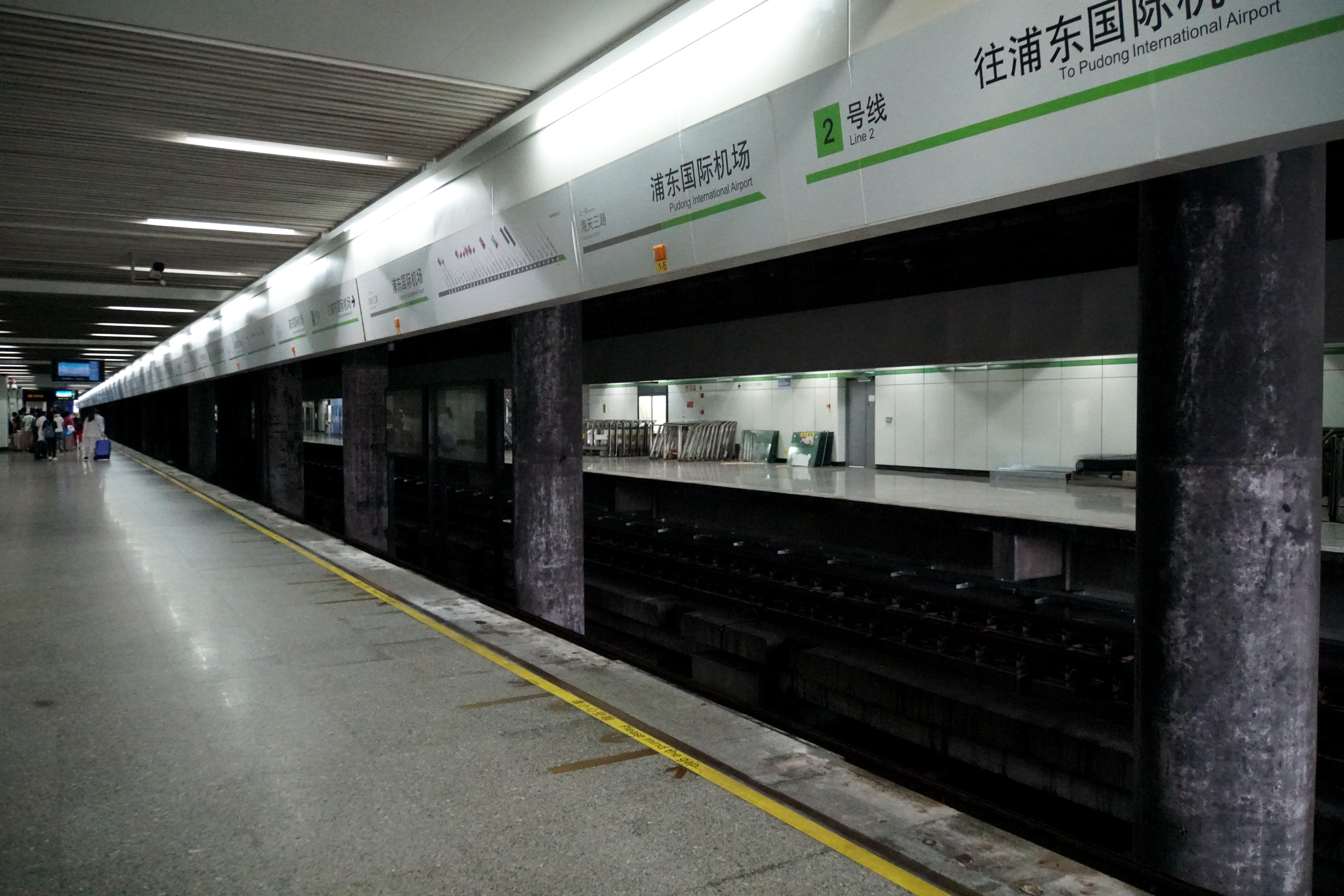 无安全门的2号线浦东国际机场站